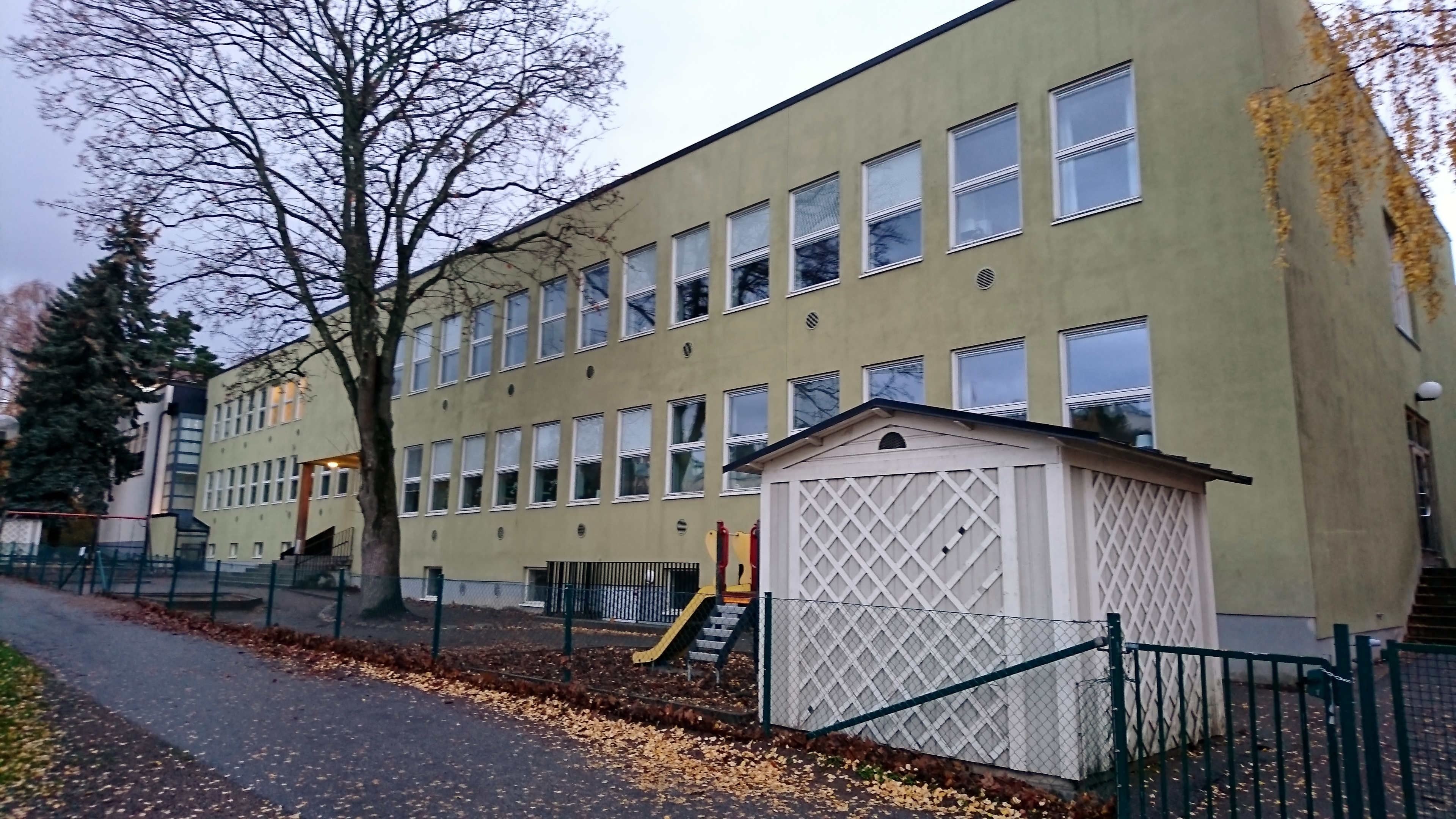 Tidigare skolbyggnad vid före detta Signalregementet (S 1) i Lilla Frösunda. Sedan 1999 huserar byggnaden friskolan Alfaskolan.